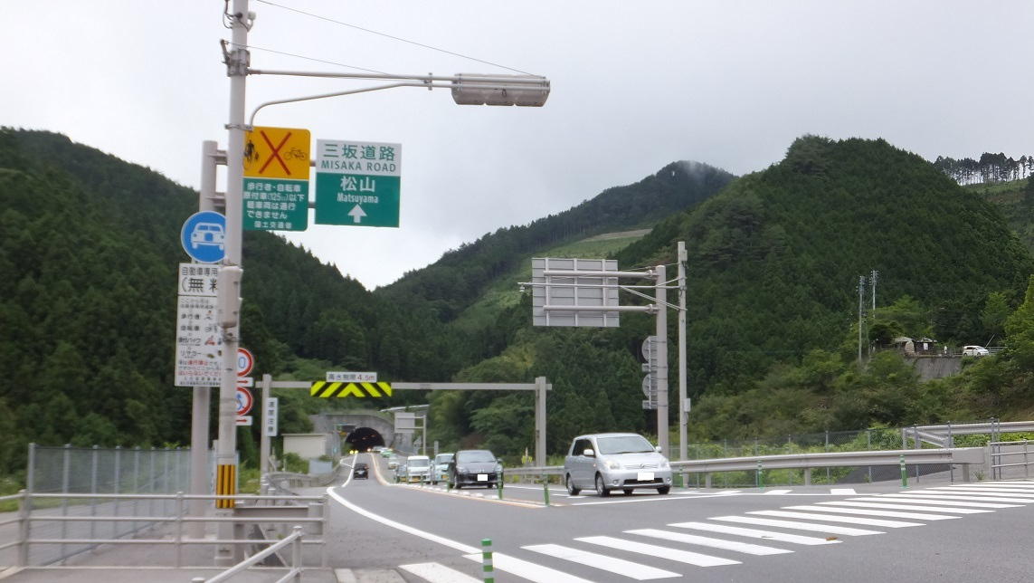 愛媛県上浮穴郡久万高原町 三坂道路起点